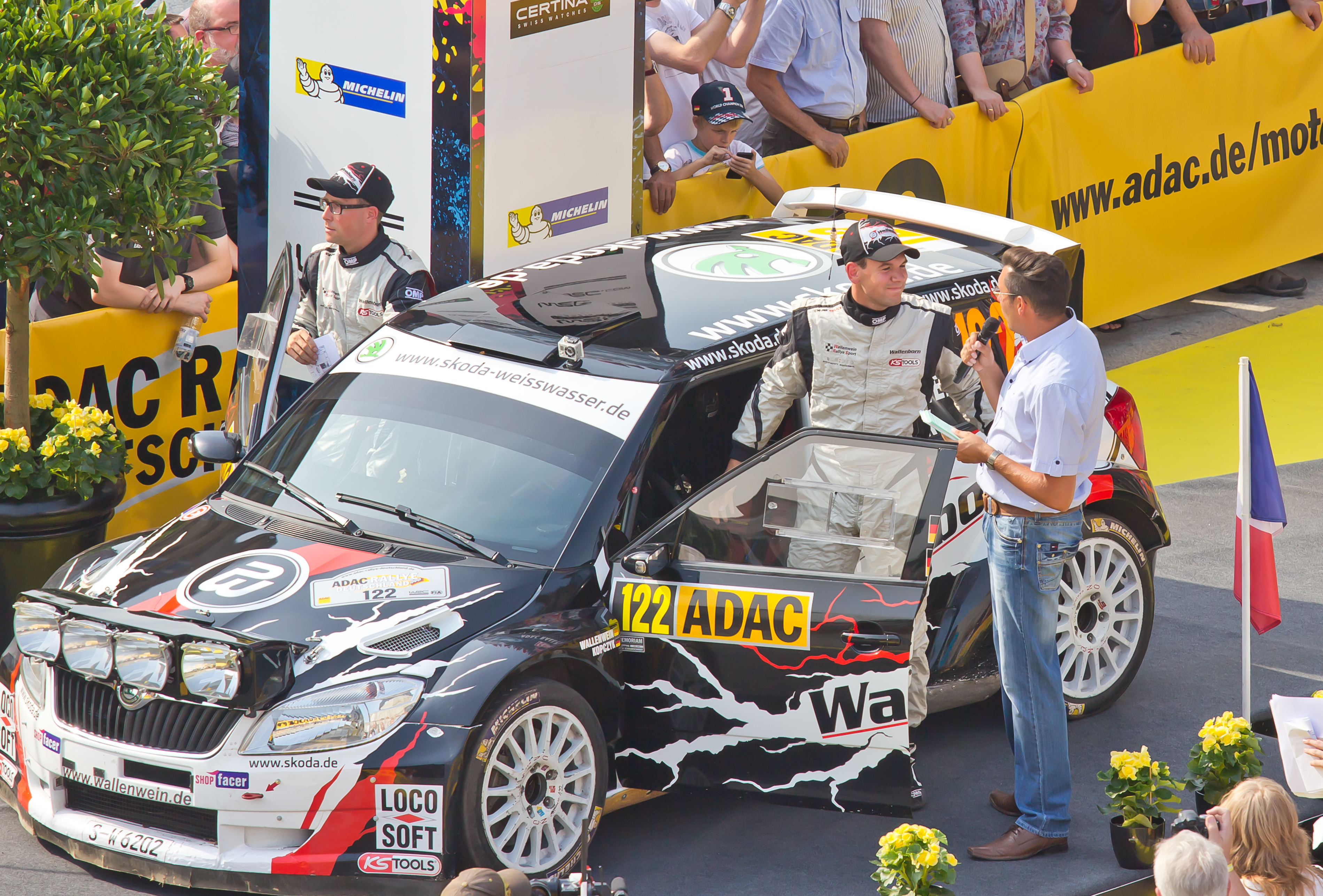 ADAC Rallye Deutschland 2013 - Fahrerpräsentation auf dem Roncalliplatz: Fahrer Mark Wallenwein und Co-Fahrer Stefan Kopczyk im Škoda Fabia S2000